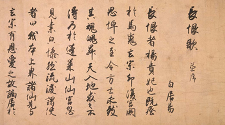 Text, geschrieiben von Shôkadô